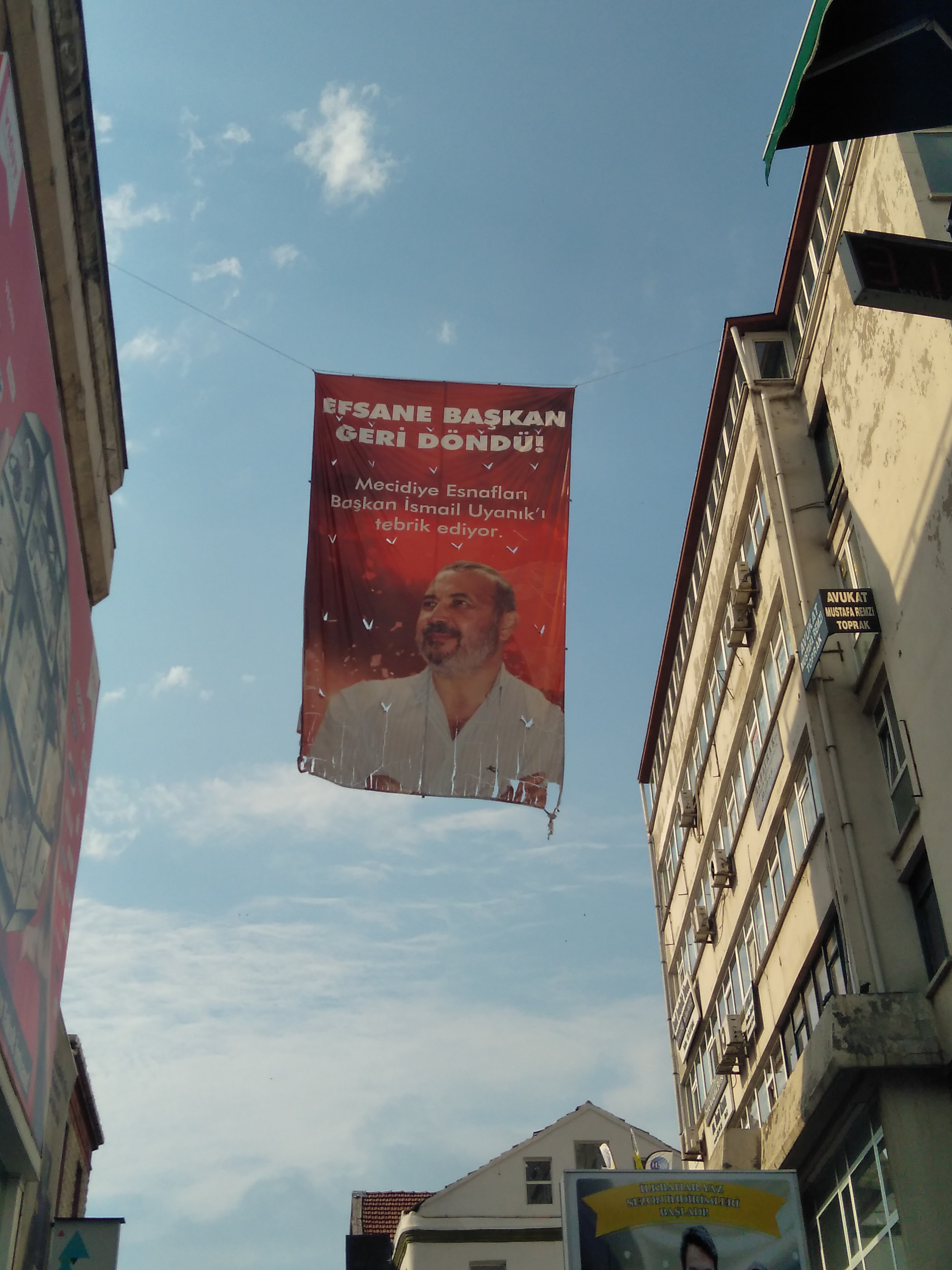 Samsun'un Mecidiye çarşısında İsmail Uyanık portresi ile "Efsane başkan geri döndü!" yazısına yer verilen afiş.